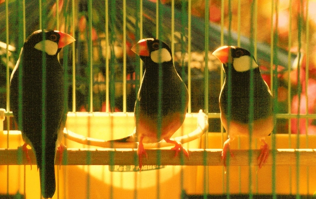 Java Finch (Padda oryzivora)